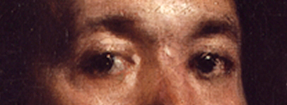 Detalla de los ojos de la pintura de Velázquez titulada Retrato de Juan Pareja